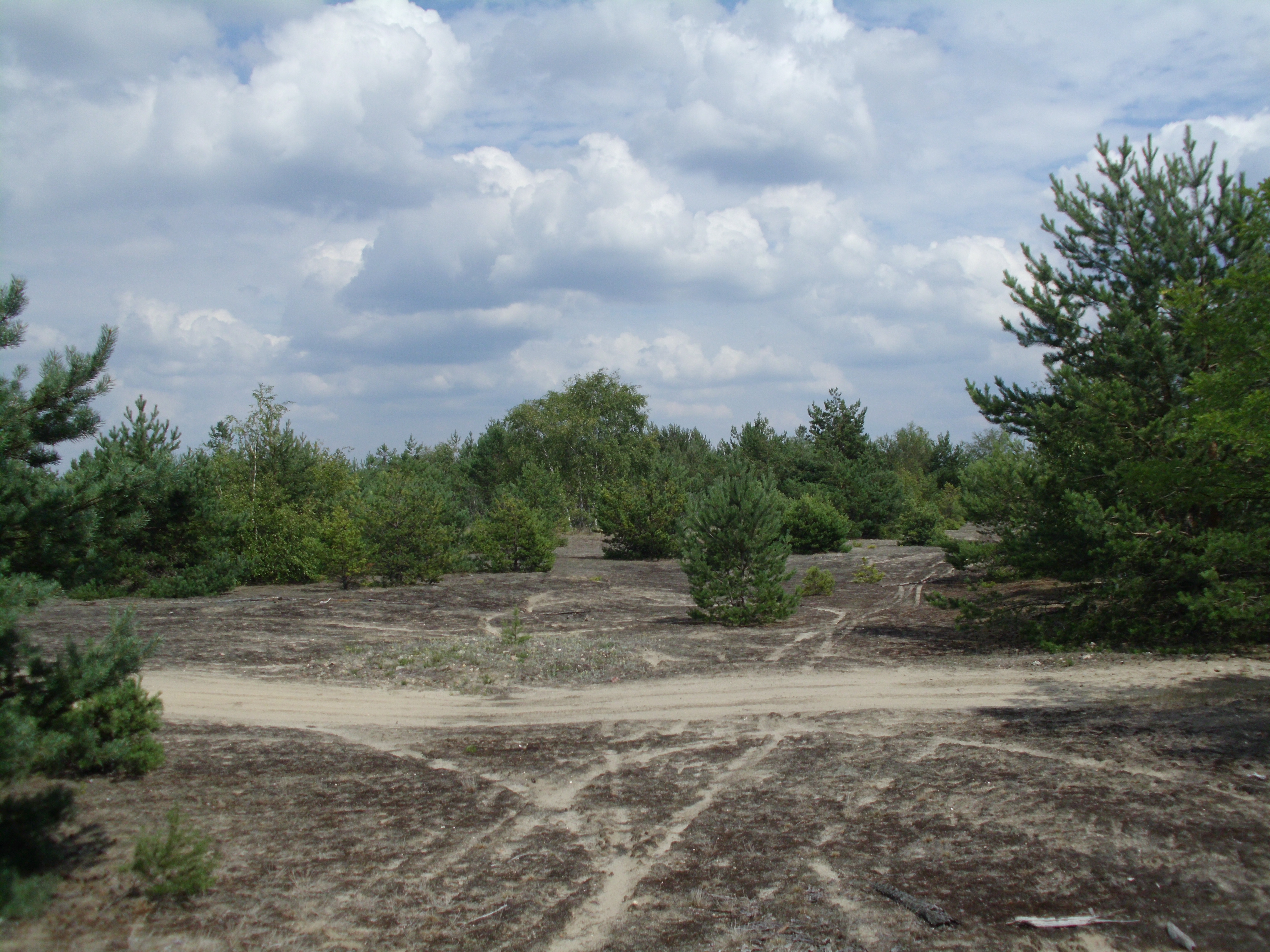 Lieberoser Heide, Lieberose, Brandenburg, Deutschland.